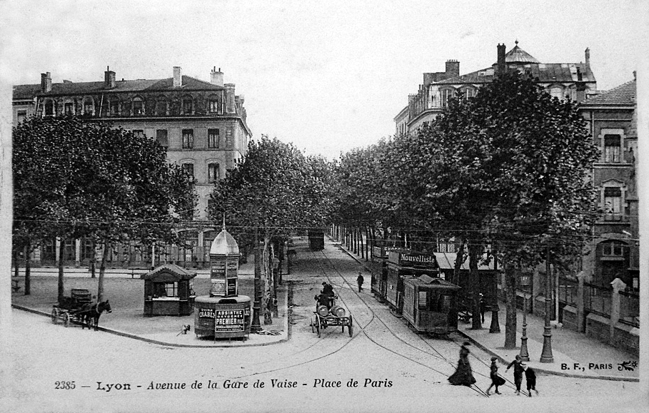 À Lyon, le tramway sur la place de Paris face à la gare. Dans les années 1910-1920.